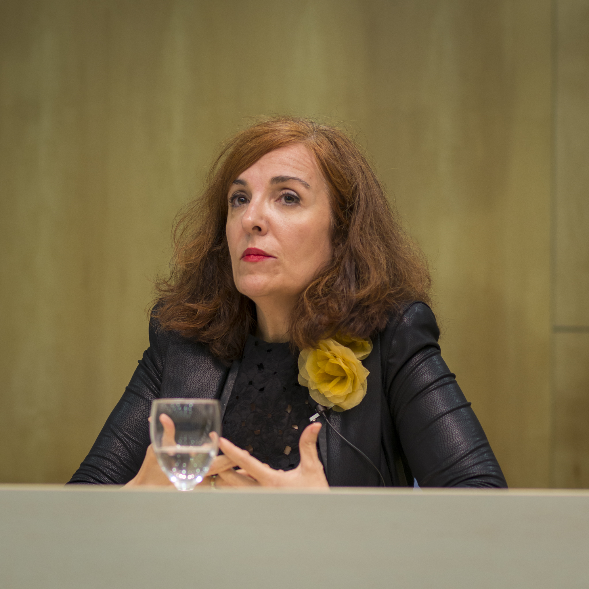 Elvira Lindo Donostian Literaktum 2016 jaialdian Elvira Lindo en Donostia / San Sebastián en el festival Literaktum 2016